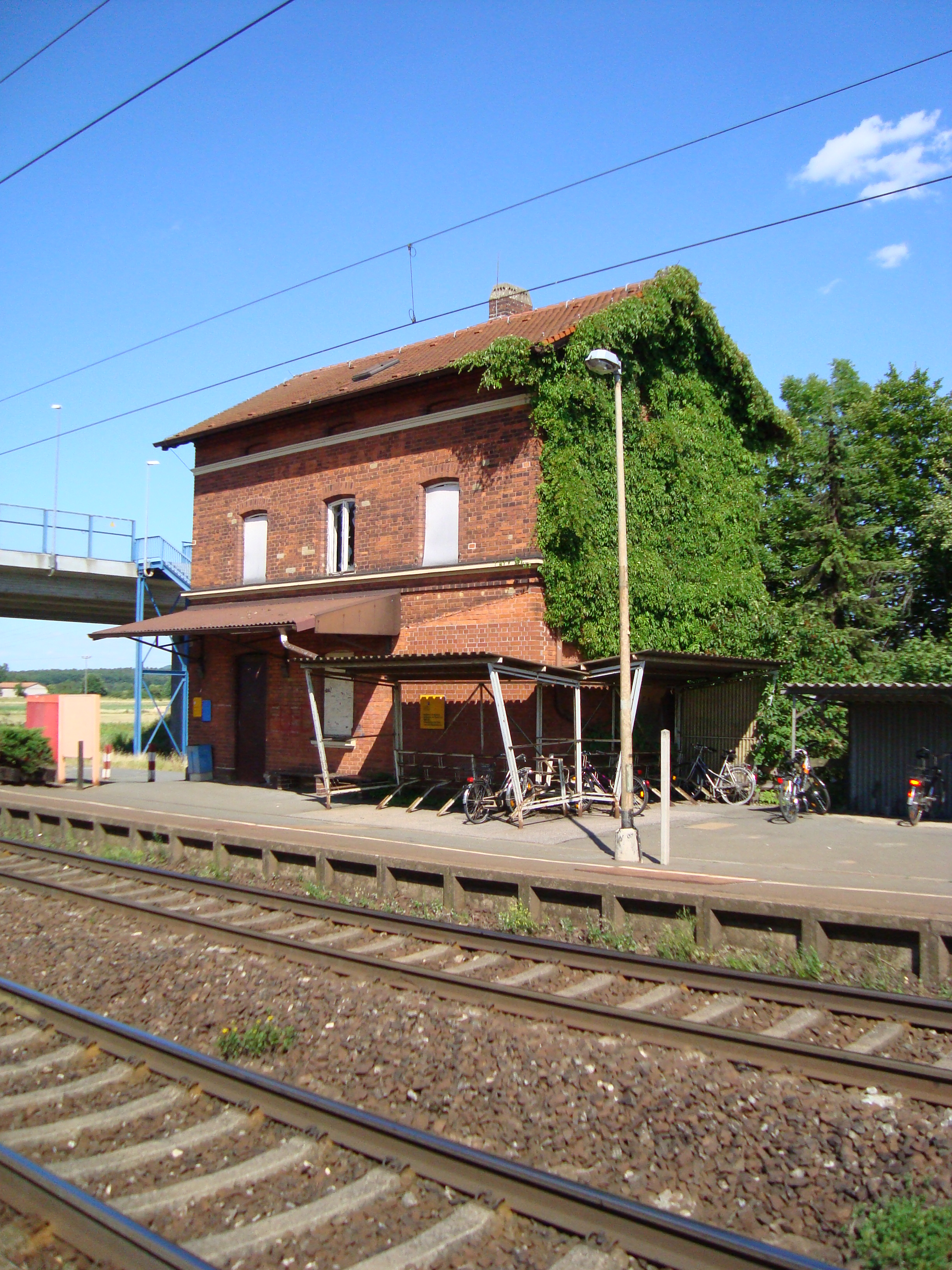 Kersbach Bahnhof